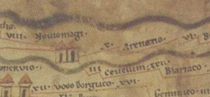 Deel van Tabula Peutingeriana met onder meer Noviomagi (Nijmegen), Ceuclum (Cuijk) en Blariaco/Blariacum (Blerick)